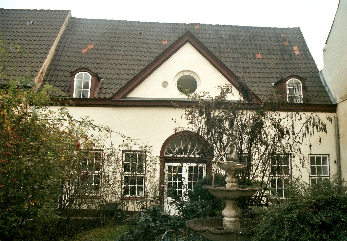 Das Wolpmann’sche Haus, ehem. Stallungen